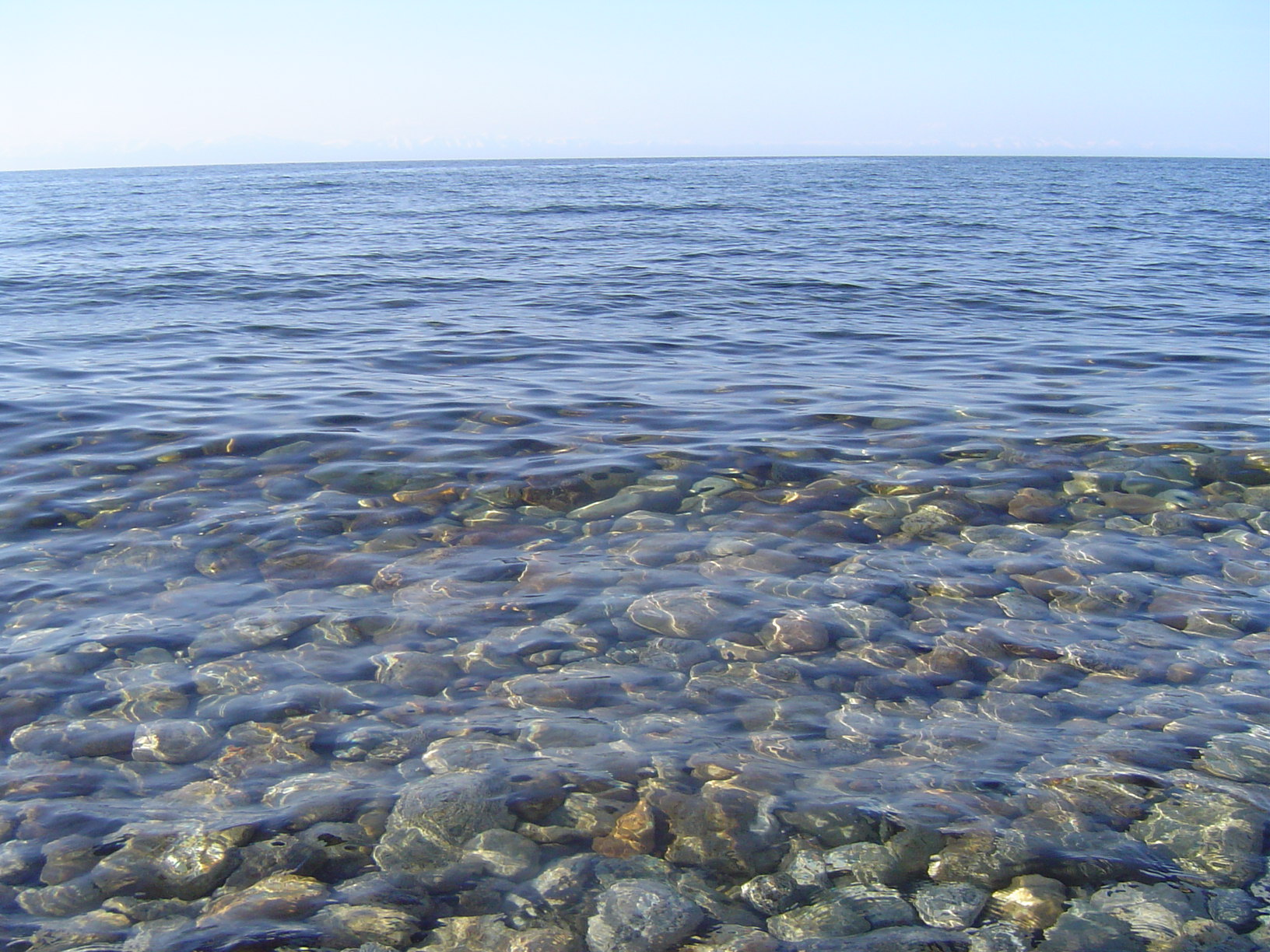 Байкал